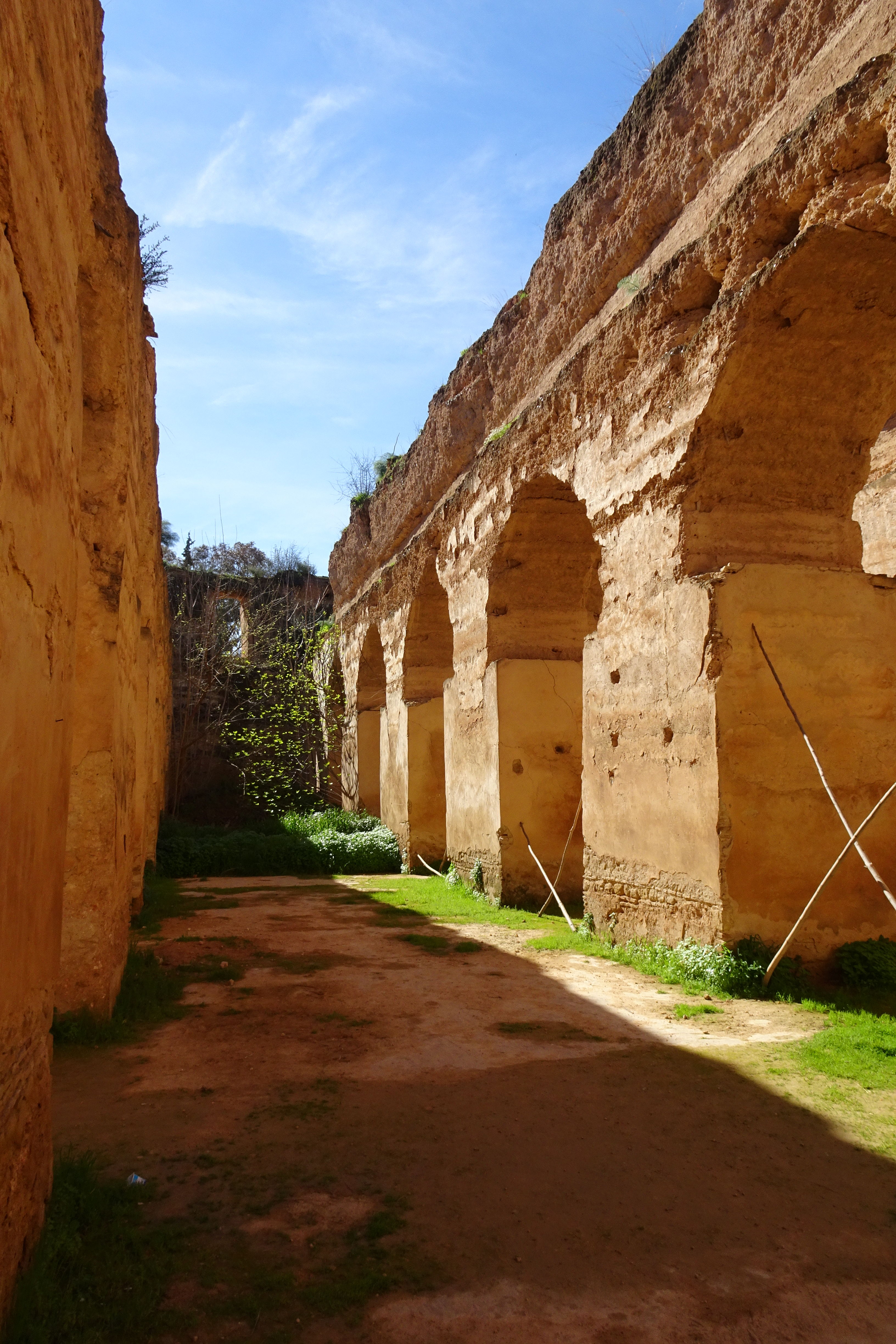 Les écuries royales de Meknès au Maroc. Gigantesque ensemble architectural édifié par Moulay Ismaïl et en partie détruit par le tremblement de terre de Lisbonne en 1755.